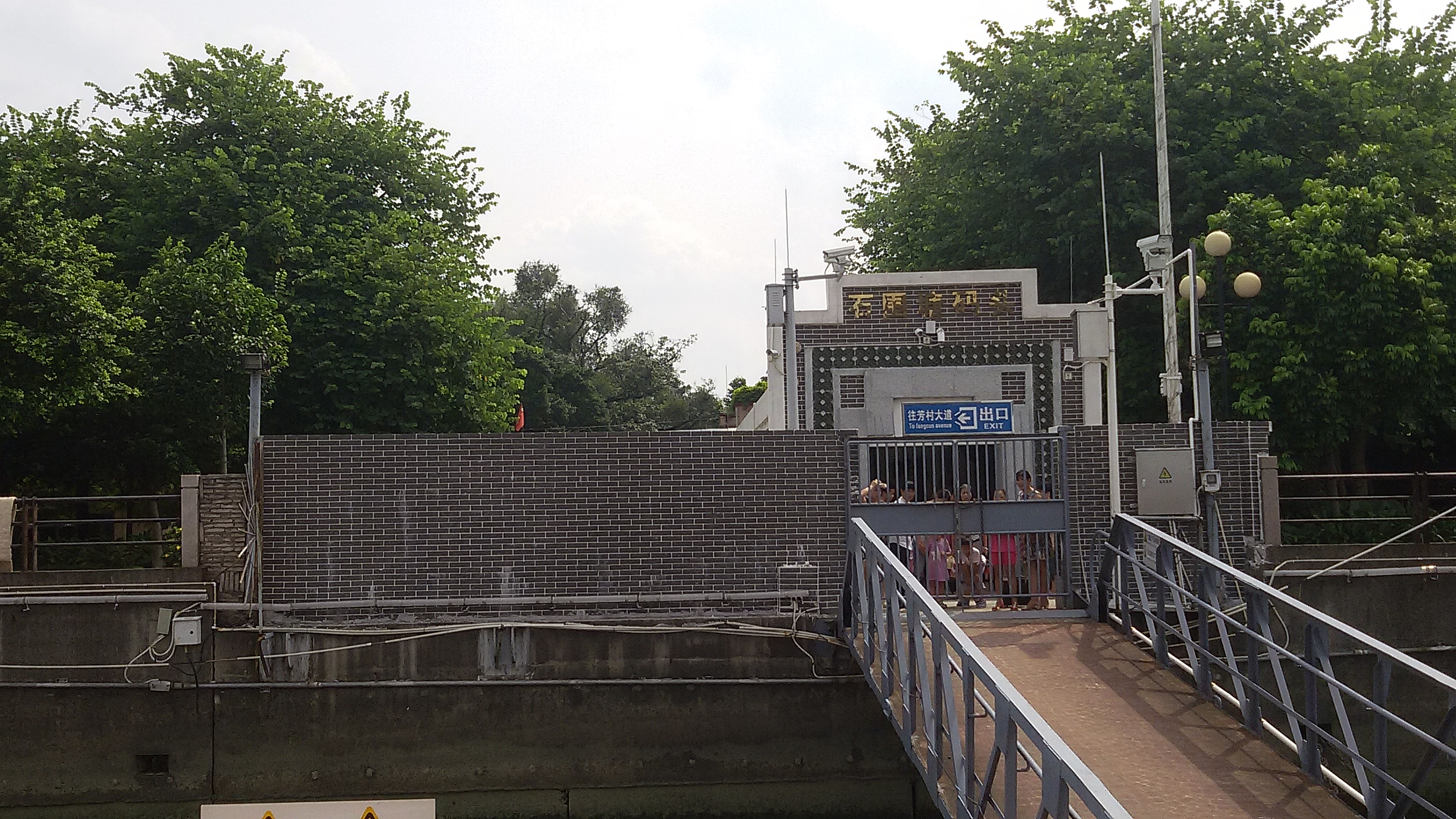 粵語: 石圍塘碼頭